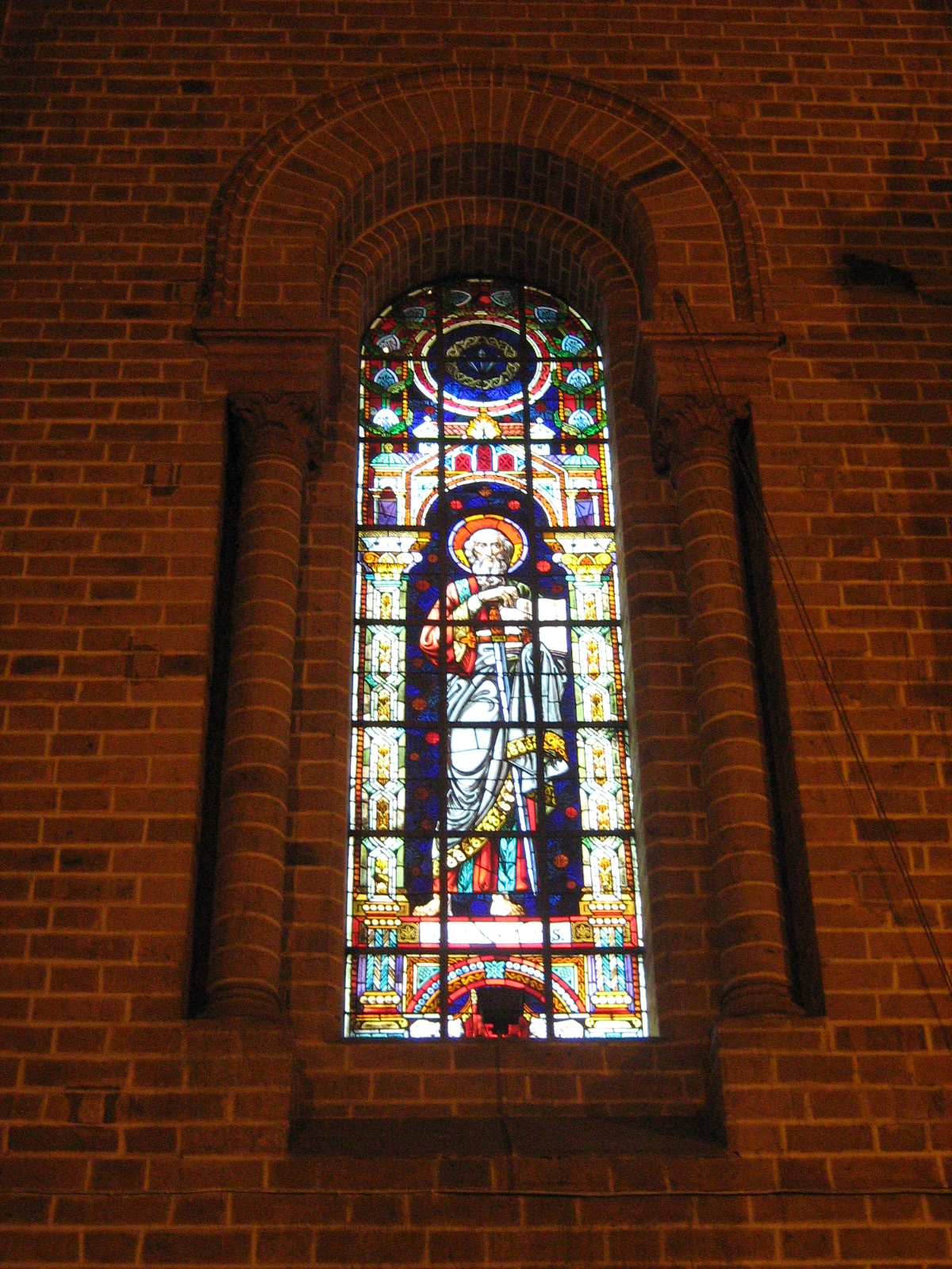 Vitral de la Catedral Metropolitana de Medellín, Colombia